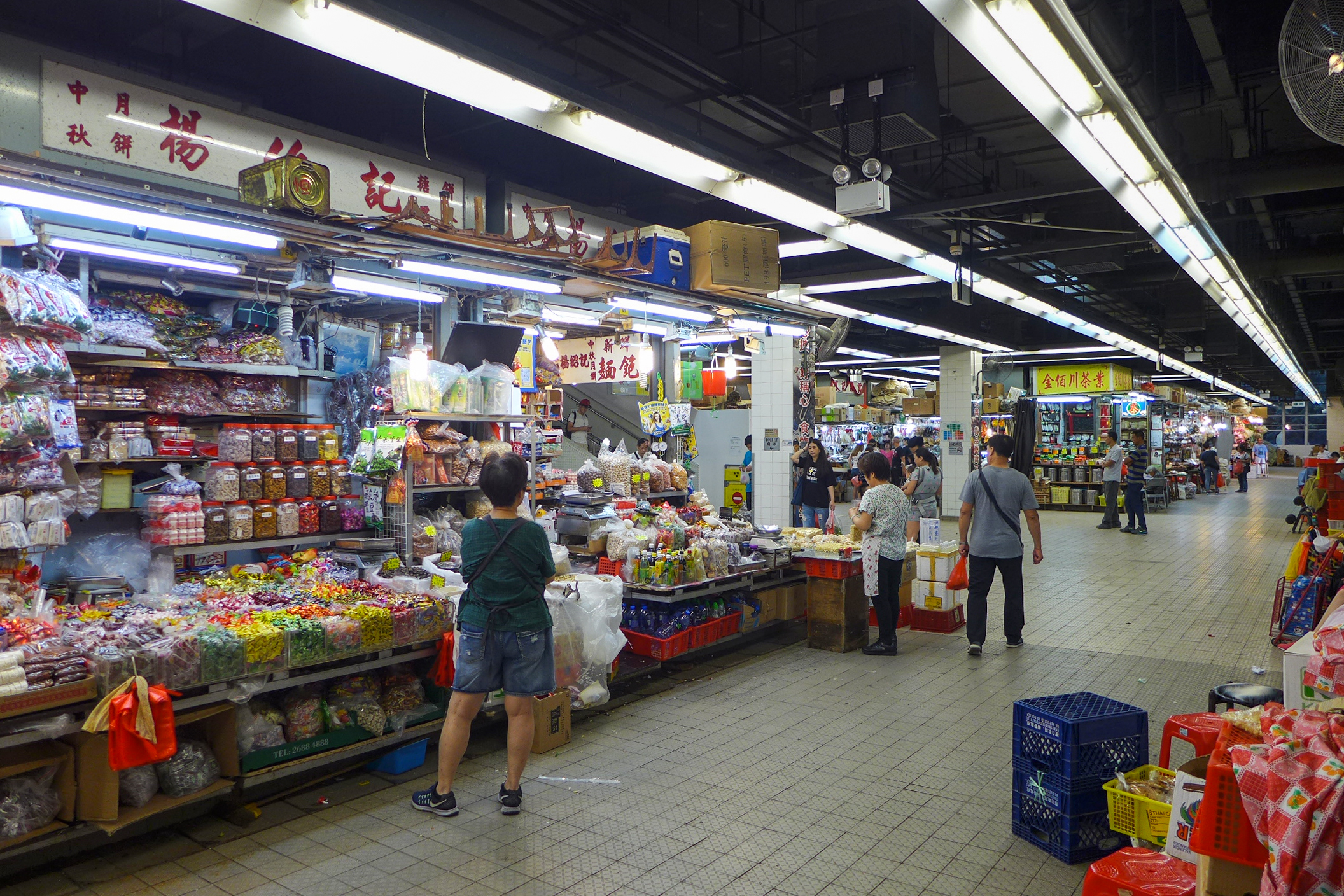 Shek Wu Hui Market